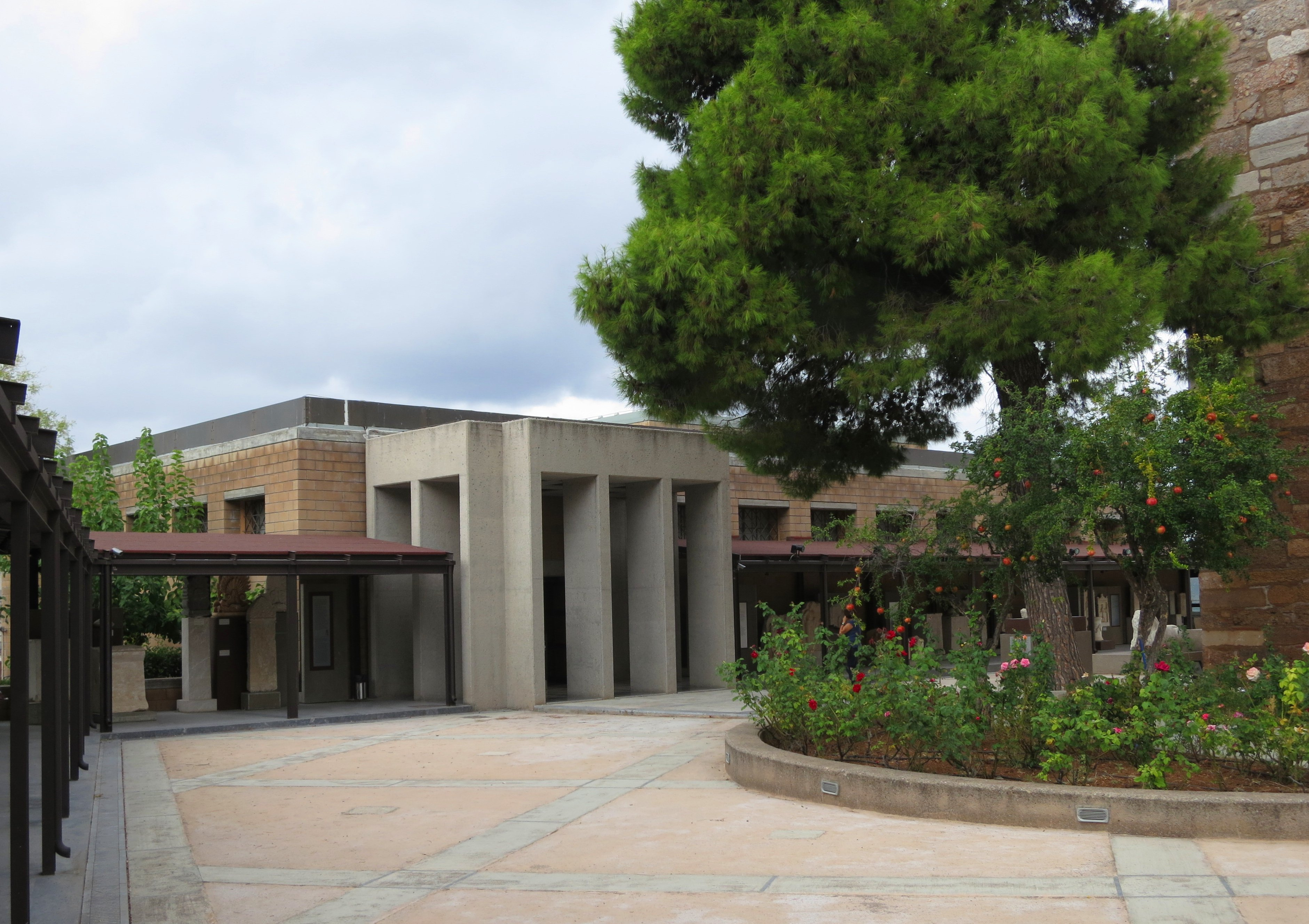 Template:Entrance